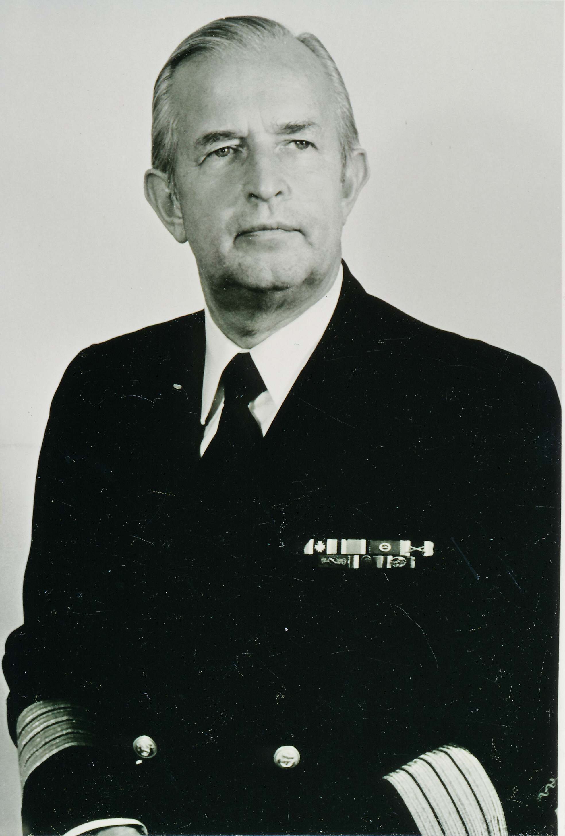 Fotografie von Flottenarzt Dr. Armin Wandel